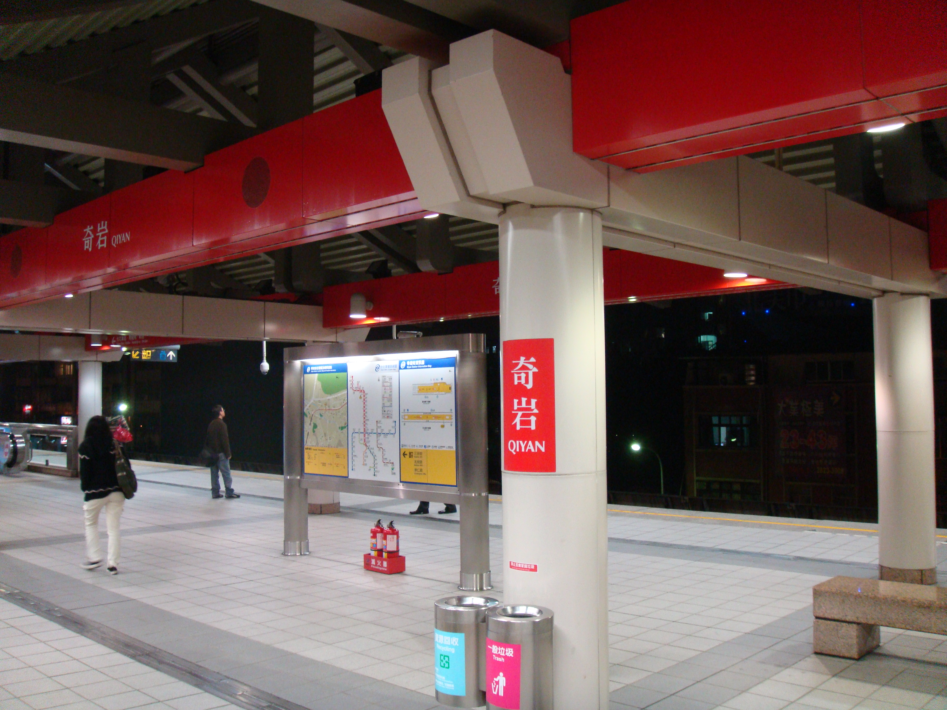 Qiyan Station, Danshui Line, Taipei Metro, Taiwan.